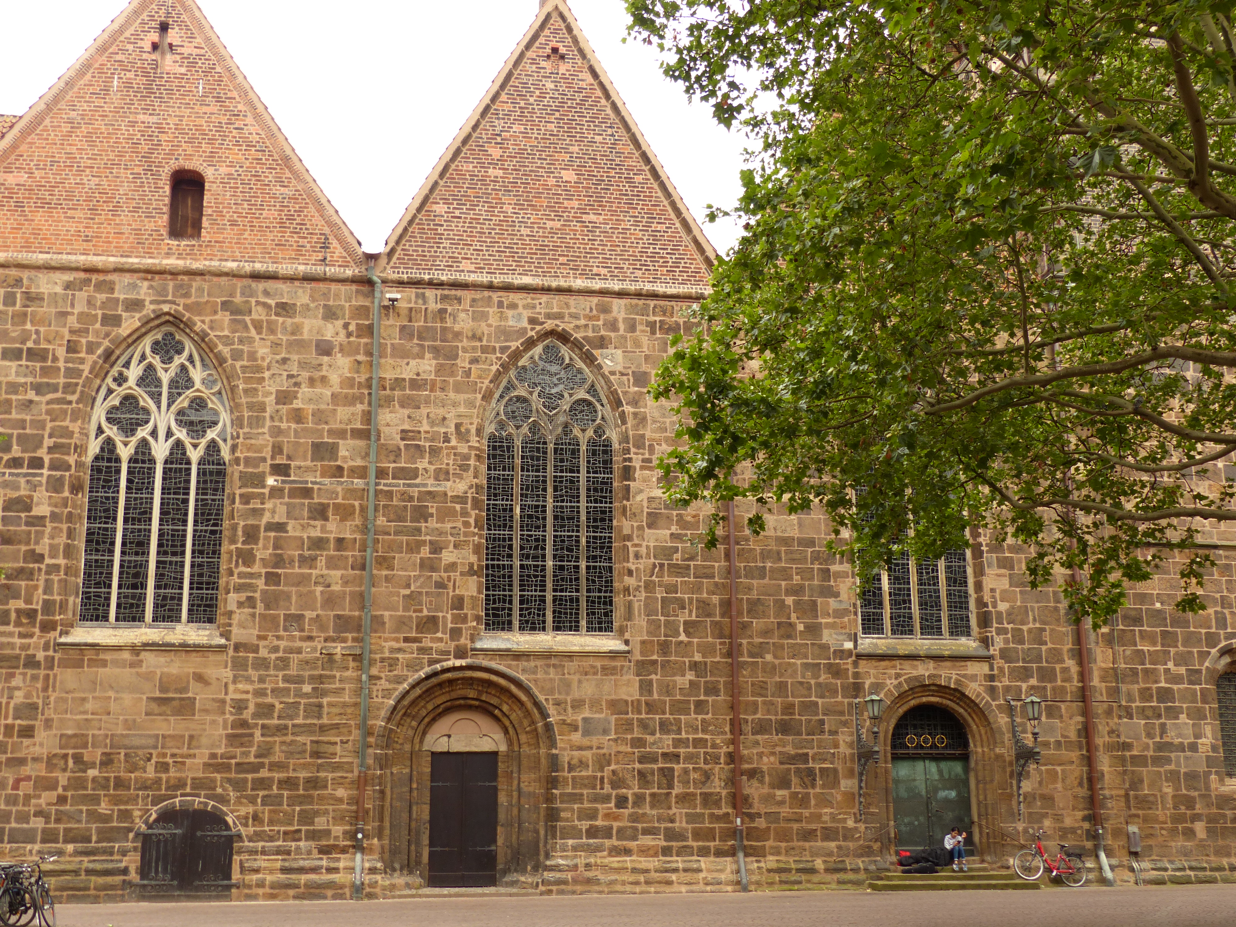 Bremen, Liebfrauenkirche, Schiff aus der Einmündung der Katharinenstr. gesehen